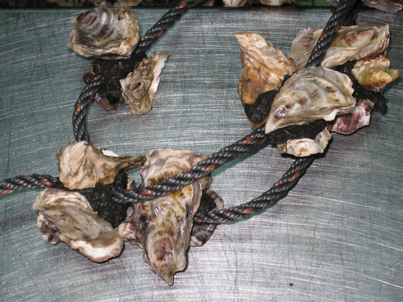 Corda de ostra portuguesa preparada para colgar da batea